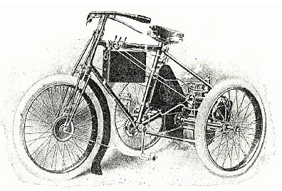 Erste ungarische Tricikl von János Csonka 1900